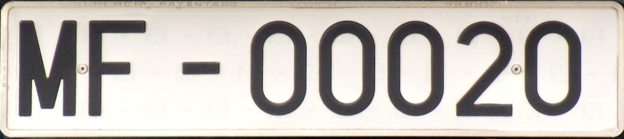 Plaque d'immatriculation espagnole "MF" du Ministère des travaux publics (Ministerio de Fomento)